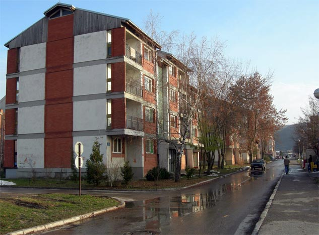 Ulica u Ugljeviku